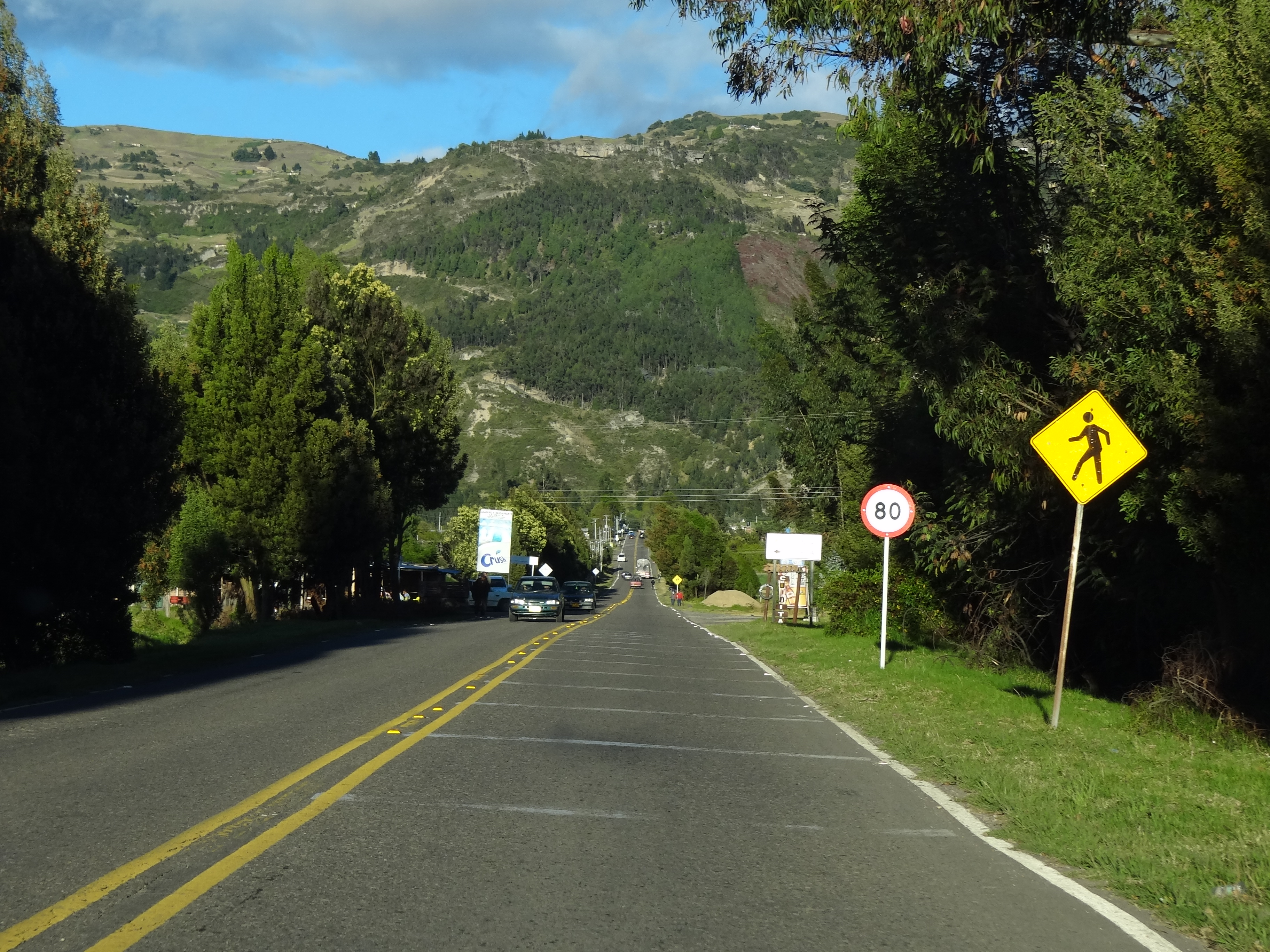 Ruta Trasversal 60 (Colombia) entre Chiquínquirá y Tunja a su paso por Cucaita